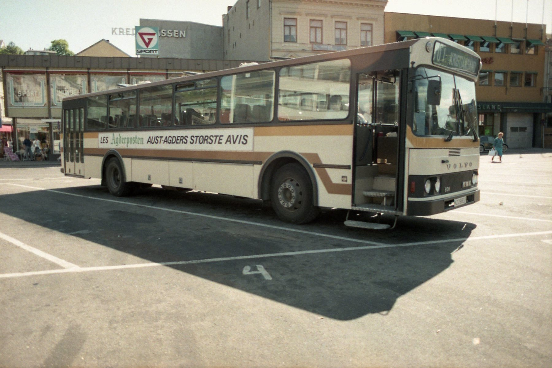 Buss fra ADS ventende på Arendal rutebilstasjon i 1983.